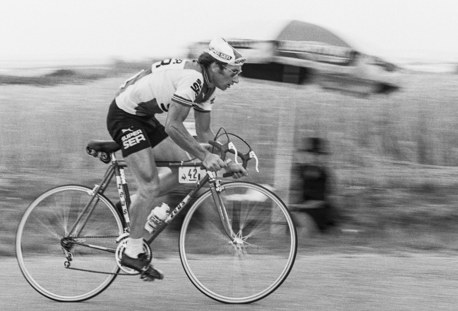 Roland Berland durant le Tour de France 1976. Photographie : René Milanese